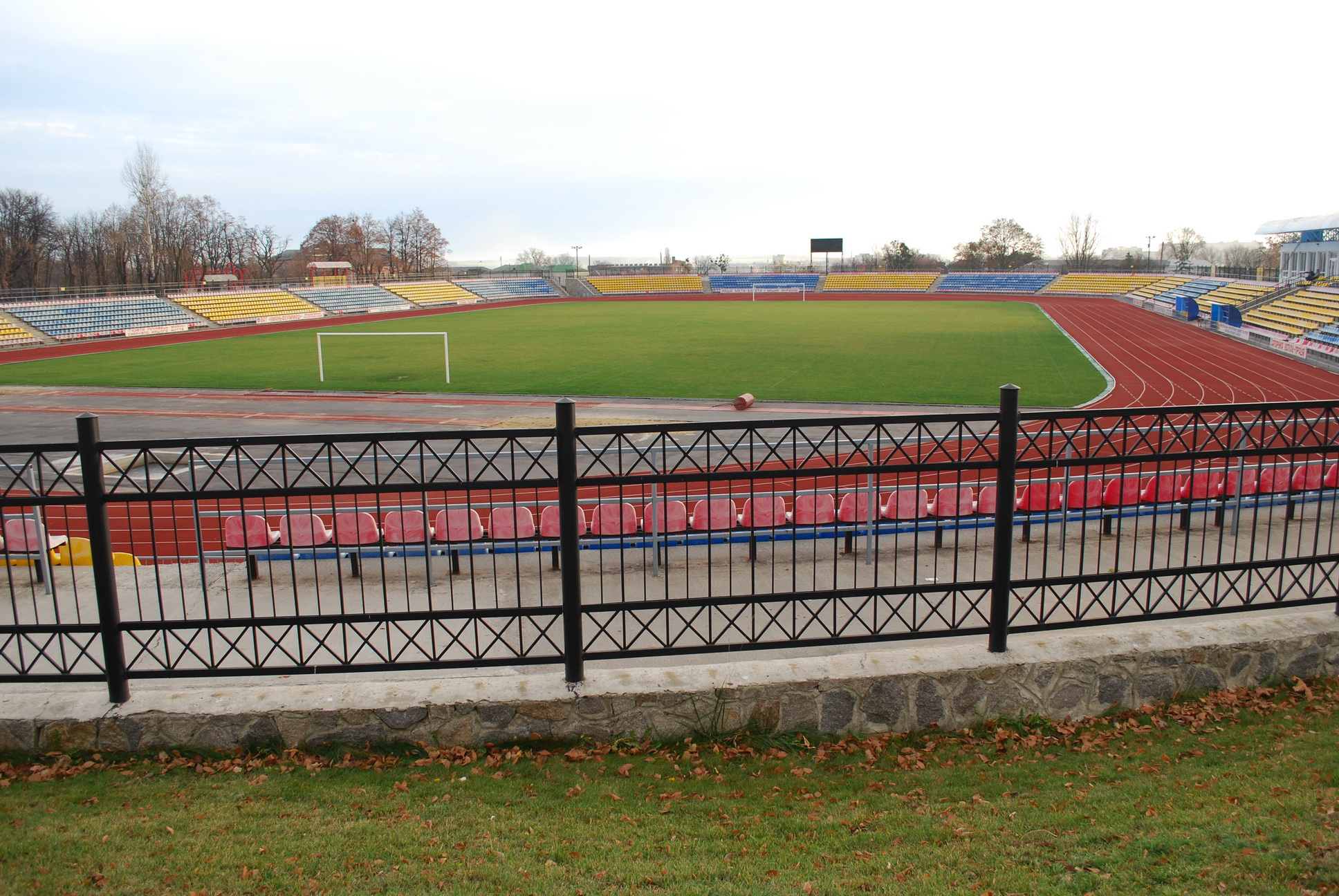 м.Умань, вул. Коломенська, 12